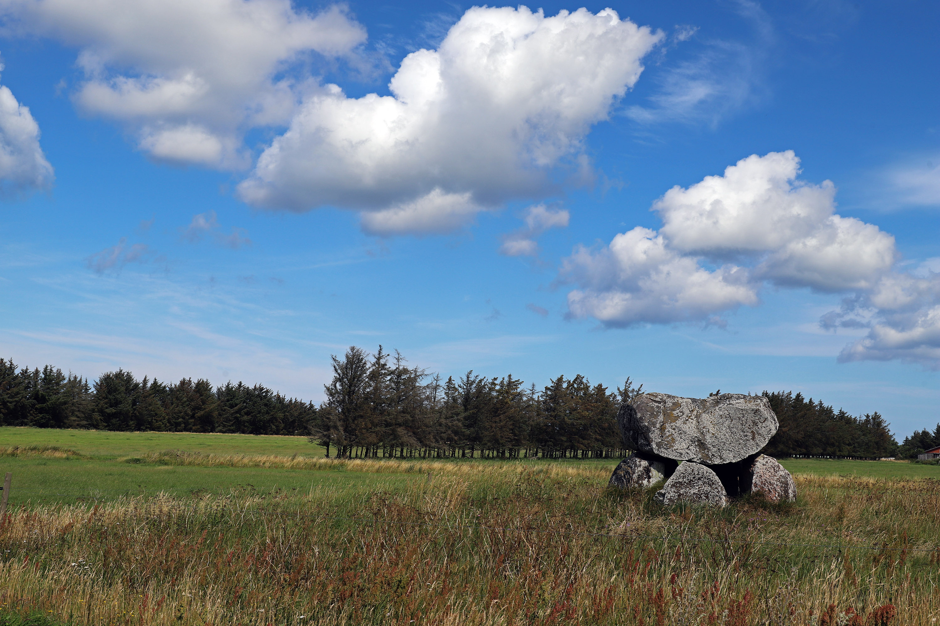 Dolmen von Tornby Dyssen